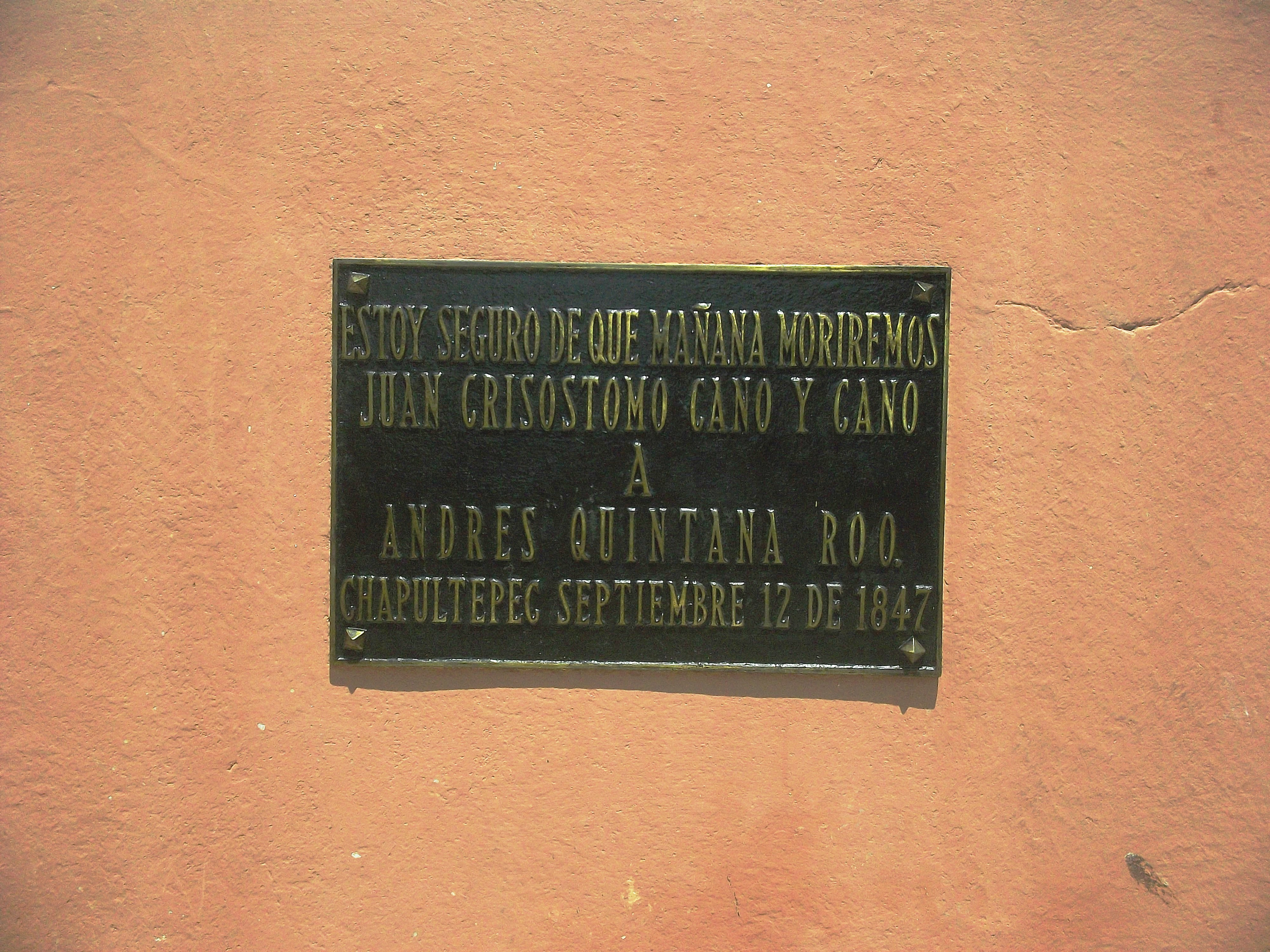 Monumento a los Niños Héroes en Mérida, Yucatán.